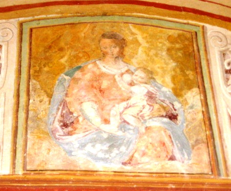 Pezzolo Valle Uzzone. Gorrino. Cappella Rurale di San Sebastiano. Parete di fondo. La Vergine in trono col Bambino